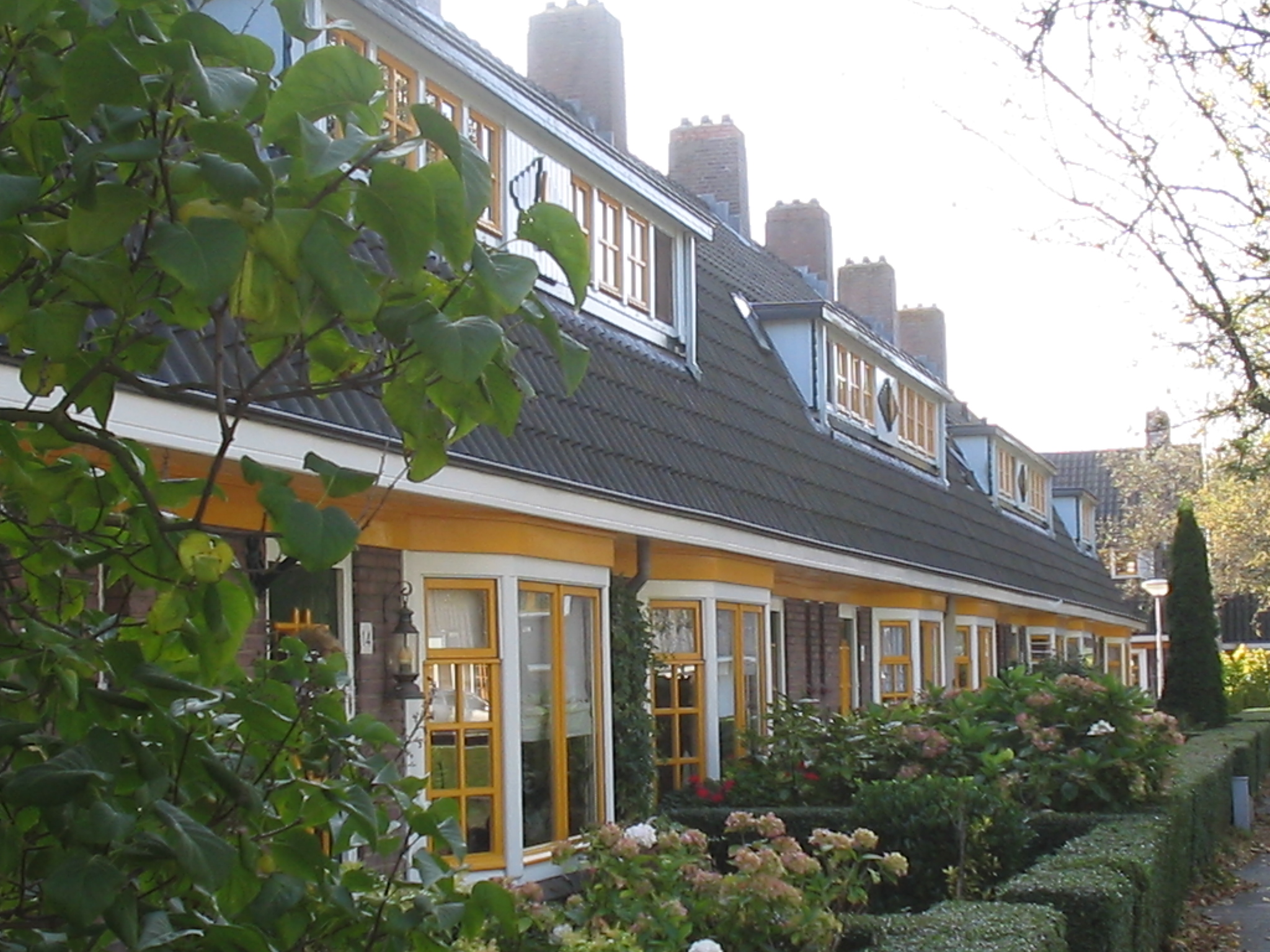 Agnetapark, Delft, 18 oktober 2005